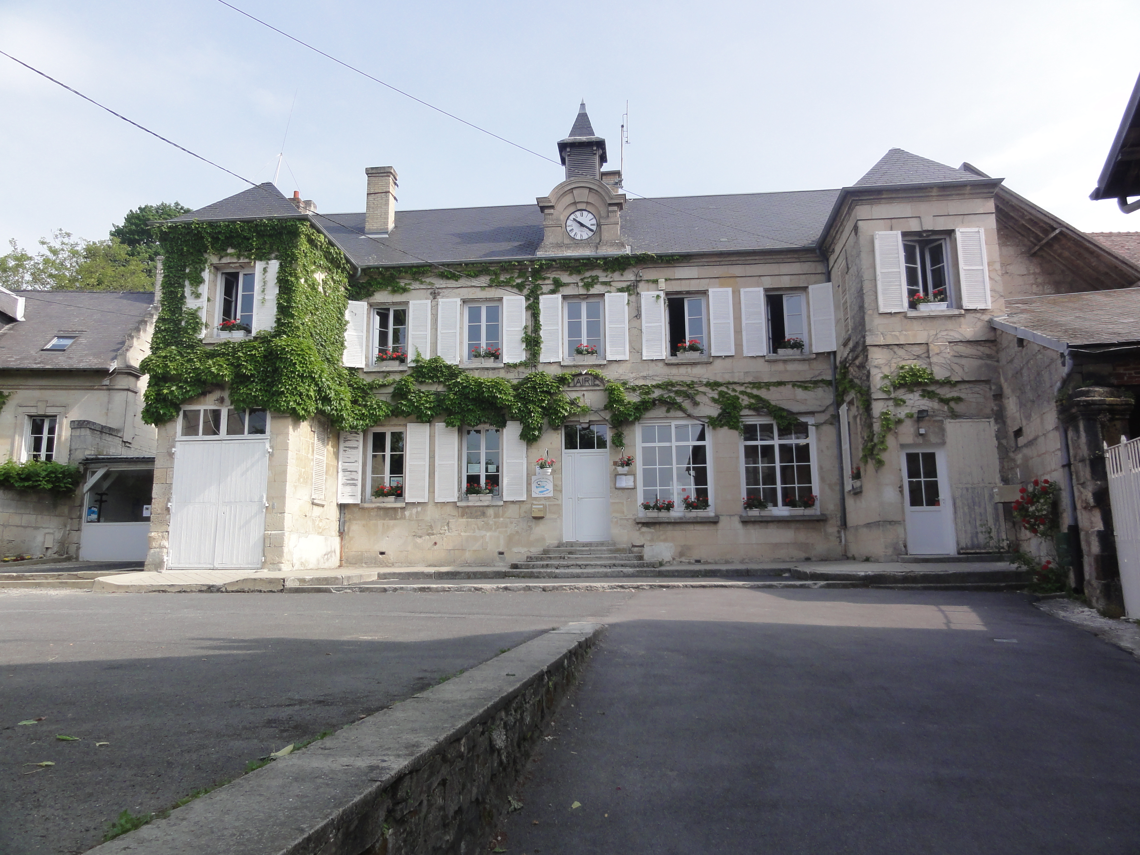 Fontenoy (Aisne) Mairie